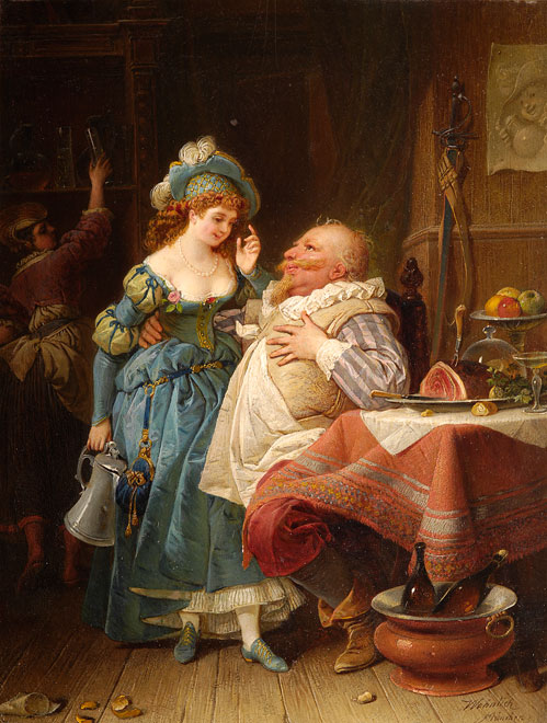 Ein ehrenwerter Galan. Signiert. Öl/Holz, 26 x 20 cm